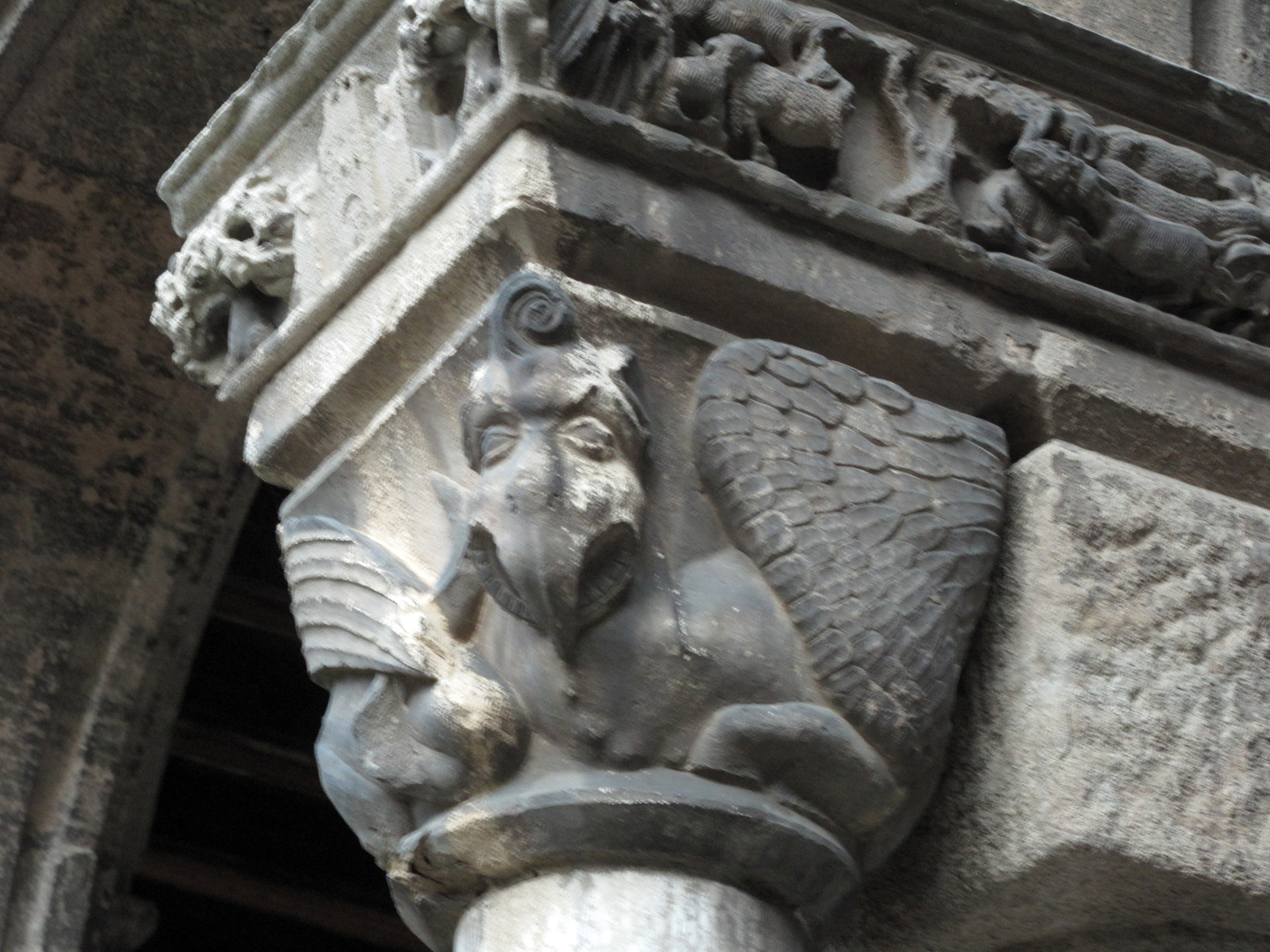 Monestir de Santa Maria de Ripoll